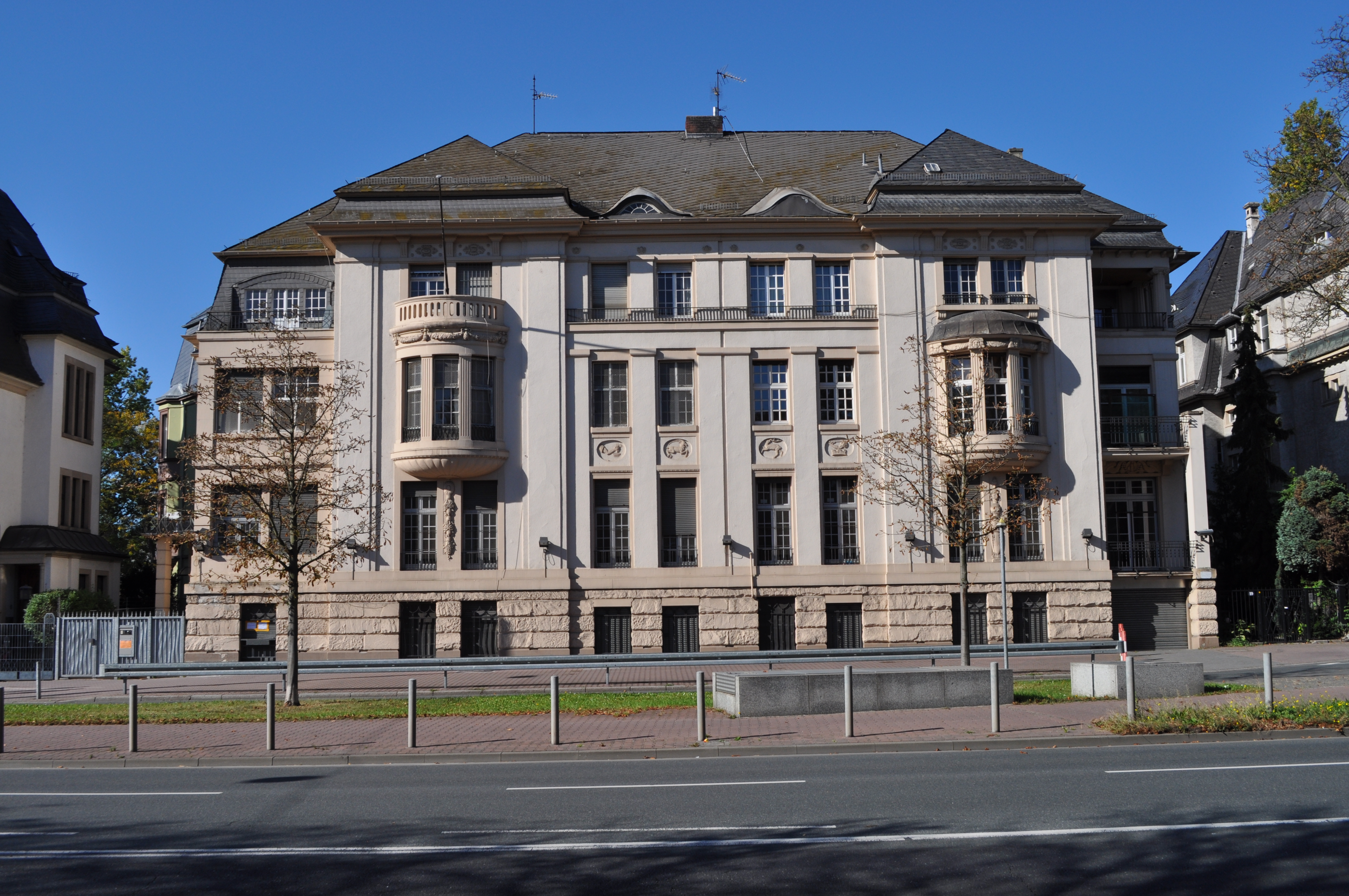 Das türkische Generalkonsulat in der Zeppelinallee 17 in Frankfurt. Der Komplex, bestehend aus einer neoklassizistische Villa von 1912 mit Hausnummer 12 und dem eigentlichen Konsulat, Zeppelinallee 17/19 einem neoklassizistischen Doppelhaus. Die repräsentative Villa wurde 1911 nach einem Entwurf des Architekten Christoph Gesser, geboren am 15.11.1880 in Offenbach-Bieber, gebaut und weist reiche plastische Stuckornamentik auf.